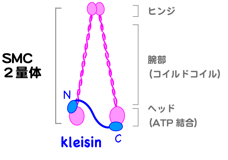 SMC-kleisin structure 4